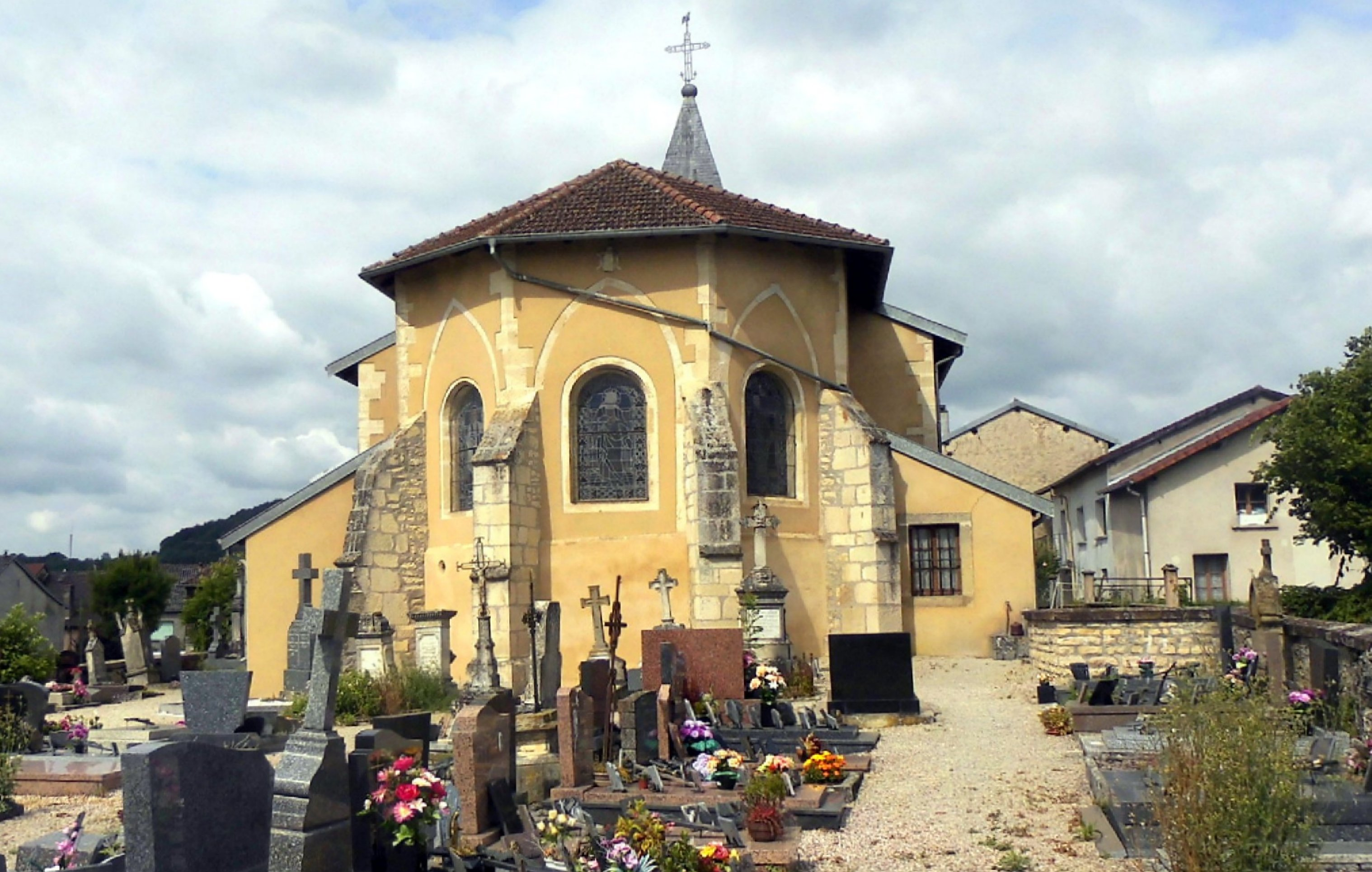 L'église Saint-Romaric de La Neuveville-sous-Montfort, côté est